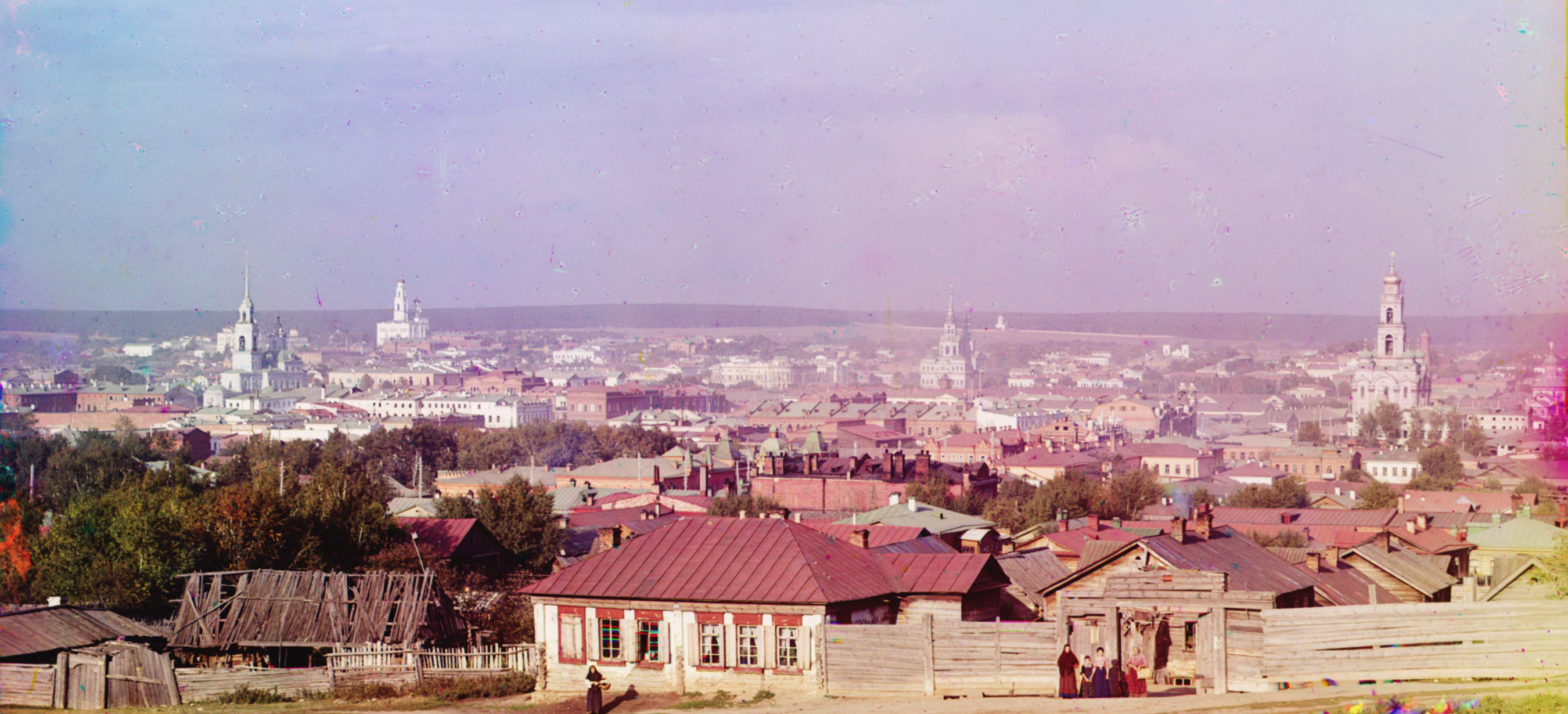 Early color photograph from Russia, created by Sergei Mikhailovich Prokudin-Gorskii as part of his work to document the Russian Empire from 1909 to 1915